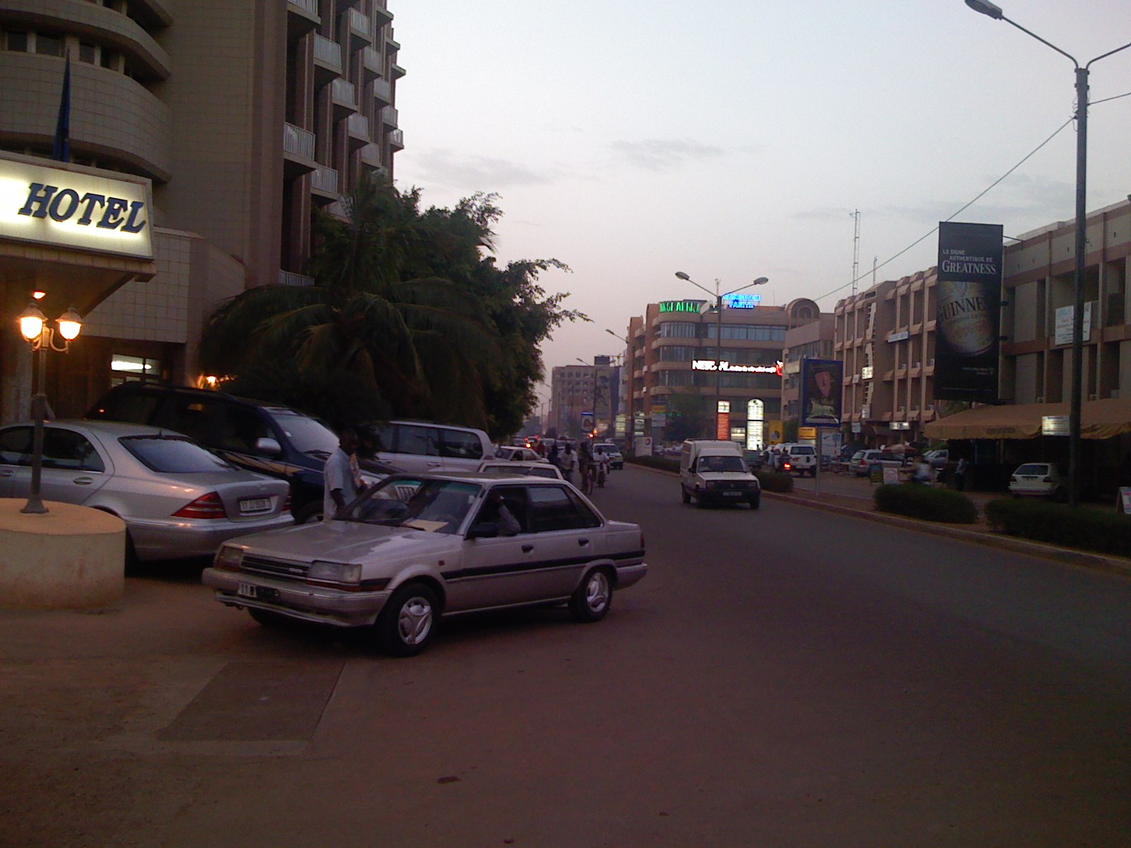 Avenue Kwamé N'Krumah à Ouagadougou (Burkina Faso) au crépuscule